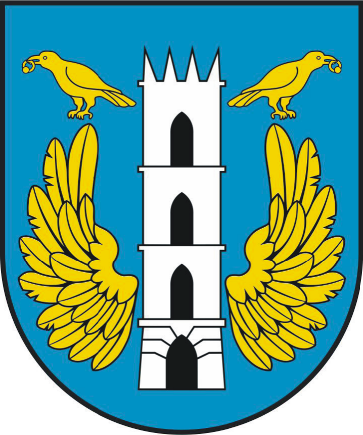 Herb gminy Opinogóra Górna